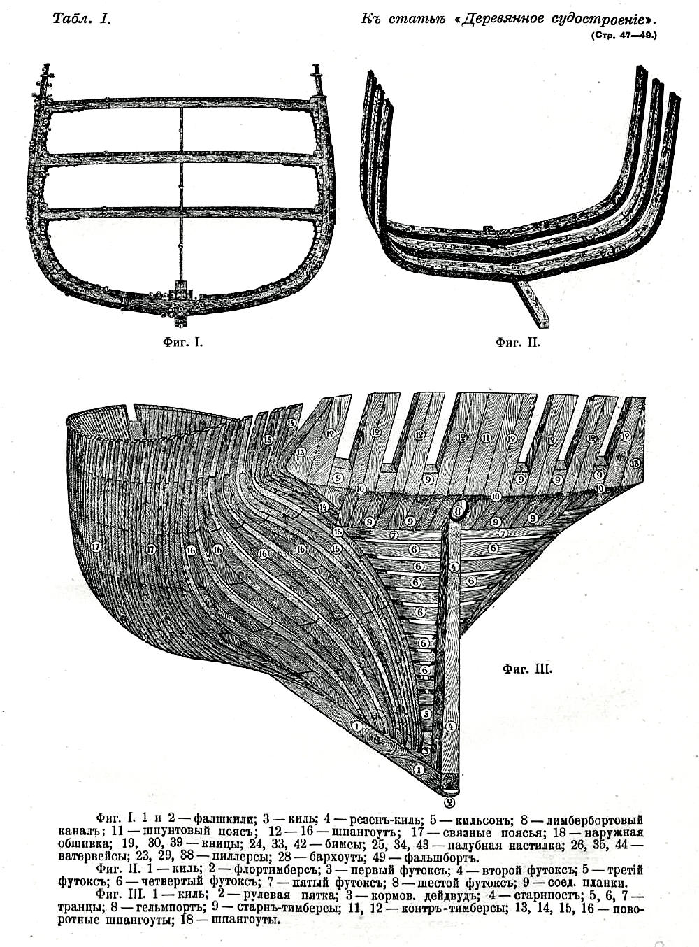 Фигура I. 1 и 2 — фалшкили; 3 — киль; 4 — резенъ-киль; 5 — кильсонъ; 8 — лимбербортовый каналъ; 11 — шпунтовый поясъ; 12 — 16 — шпангоутъ; 17 — связные поясья; 18 — наружная обшивка; 19, 30, 39 — кницы; 24, 33, 42 — бимсы; 25, 34, 43 — палубная настилка; 26, 35, 44 — ватервейсы; 23, 29, 38 — пиллерсы; 28 — бархоутъ; 49 — фальшбортъ. Фиг. II. 1 — киль; 2 — флортимберсъ; 3 — первый футоксъ; 4 — второй футоксъ; 5 — третій футоксъ; 6 — четвертый футоксъ; 7 — пятый футоксъ; 8 — шестой футоксъ; 9 — соед. планки. Фиг. III. 1 — киль; 2 — рулевая пятка; 3 — кормов. дейдвудъ; 4 — старнпостъ; 5, 6, 7 — транцы; 8 — гельмпортъ; 9 — старнъ-тимберсы; 11, 12 — контръ-тимберсы; 13, 14, 15, 16 — поворотные шпангоуты; 18 — шпангоуты. Это изображение было использовано для иллюстрирования статьи «Деревянное судостроение» опубликованной в девятом томе «Военной энциклопедии», который был издан книгоиздательским товариществом И. Д. Сытина в 1912 году в столице Российской империи городе Санкт-Петербурге.